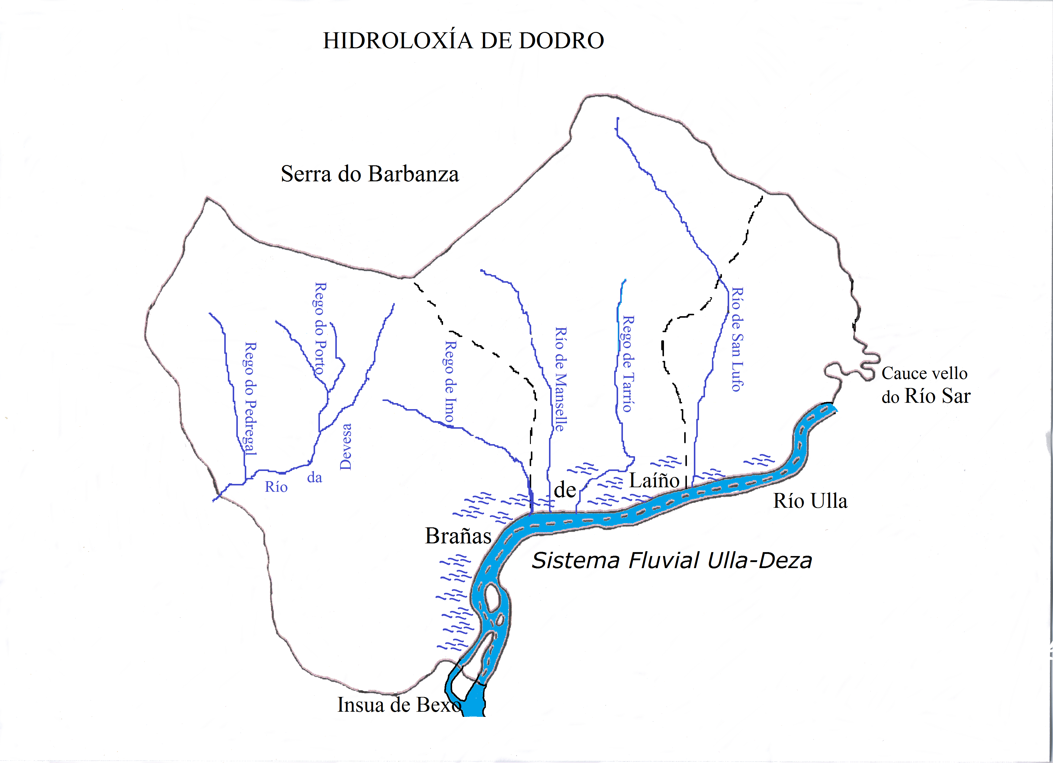 Plano da hidrografía de Dodro (A Coruña).